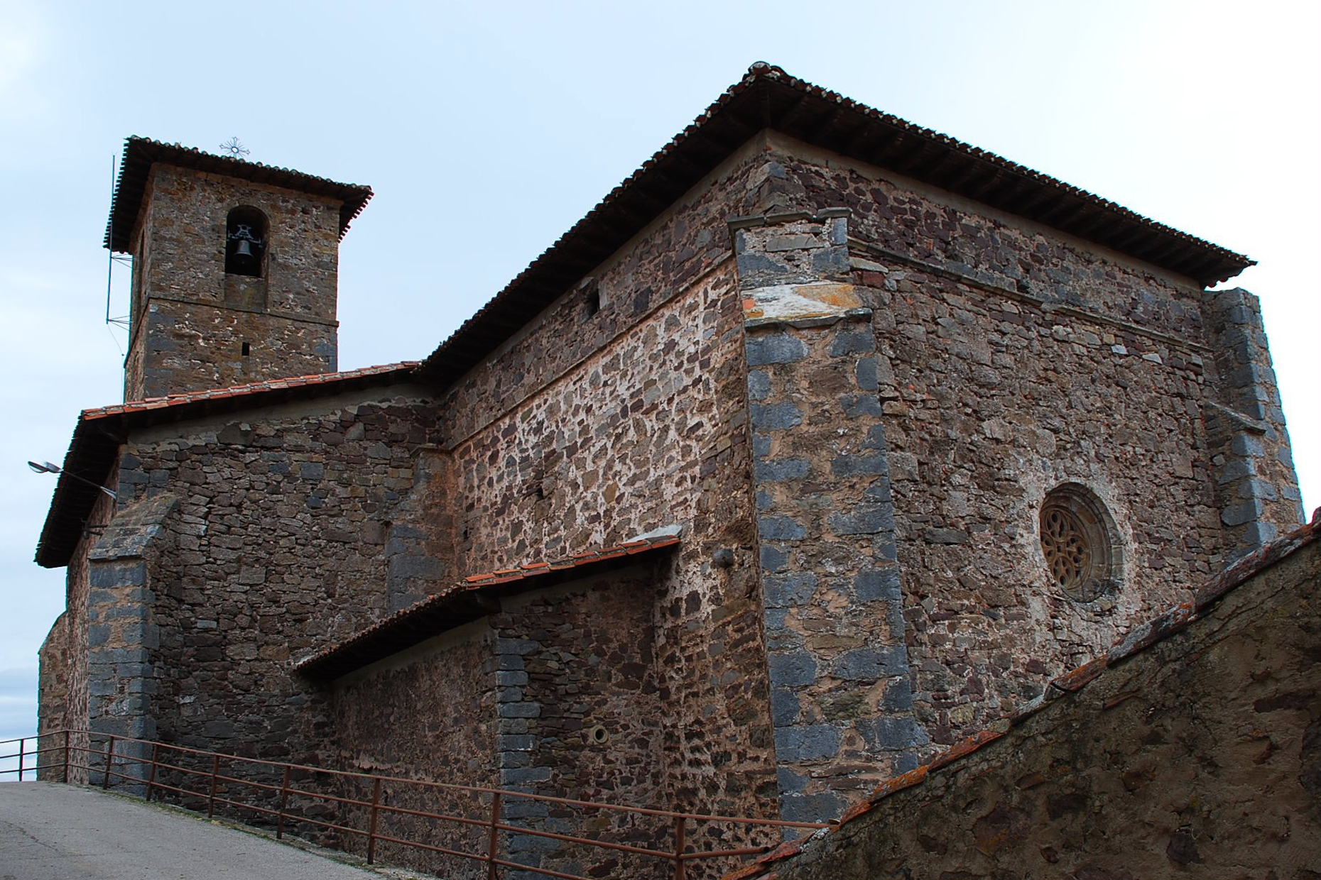 Iglesia de Montenegro de Cameros en Soria (España).